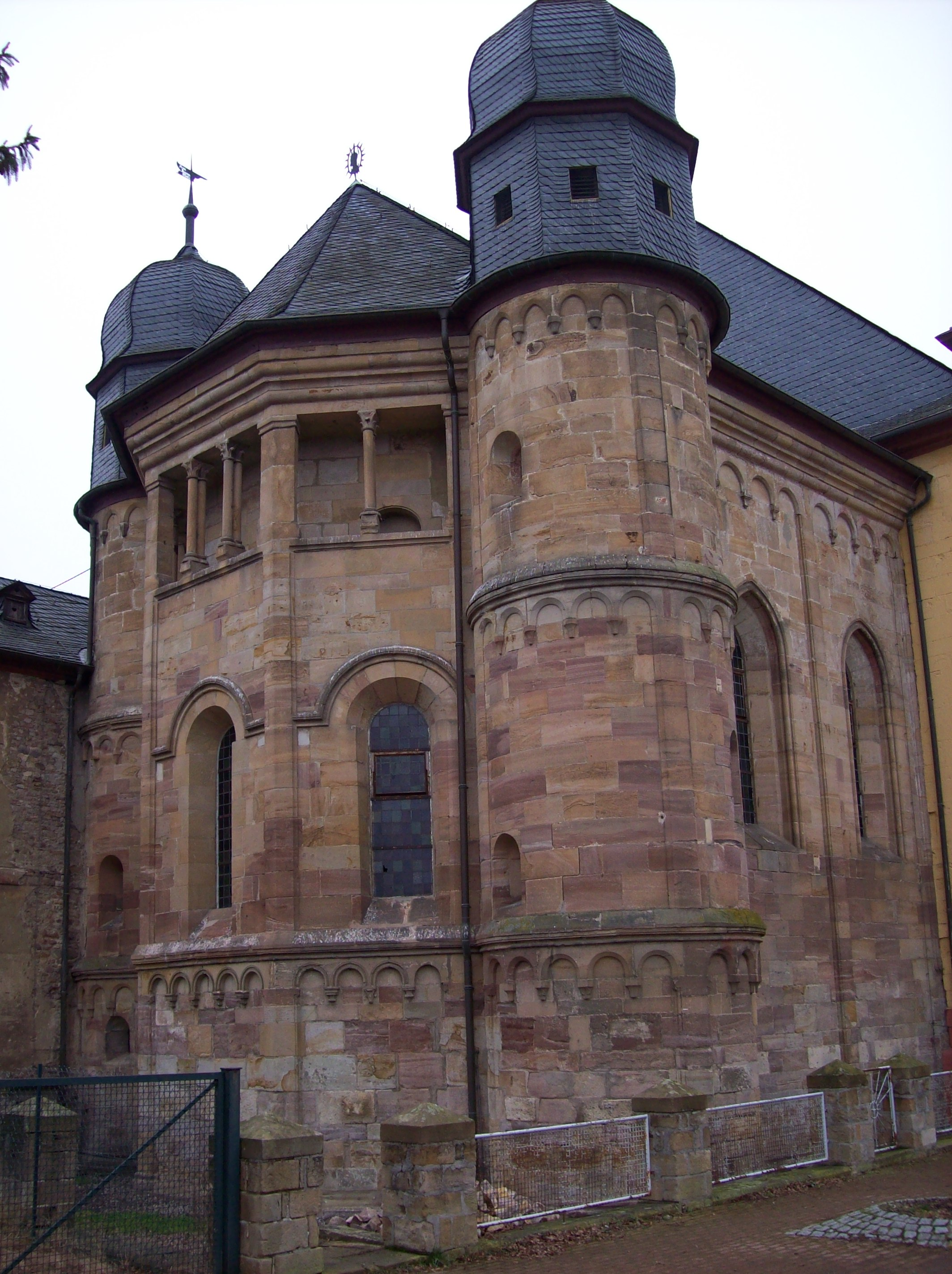 Ehemaliges Augustiner-Chorherrenstift Pfaffen-Schwabenheim, Rheinland Pfalz, heute Pfarrkirche Maria Himmelfahrt. Frühgotischer Chor von etwa 1240